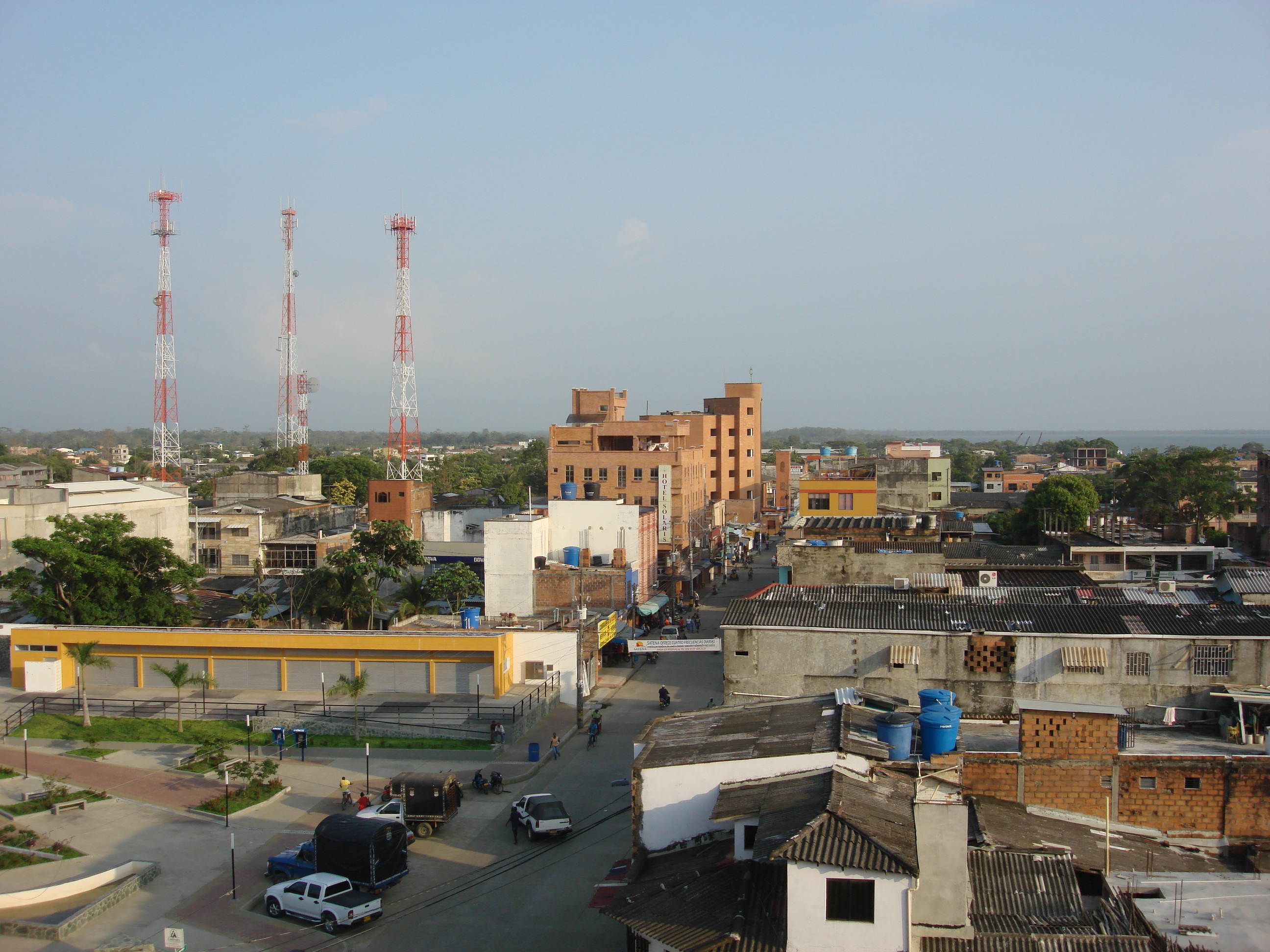 Municipio de Turbo, parque. Antiguo hospital